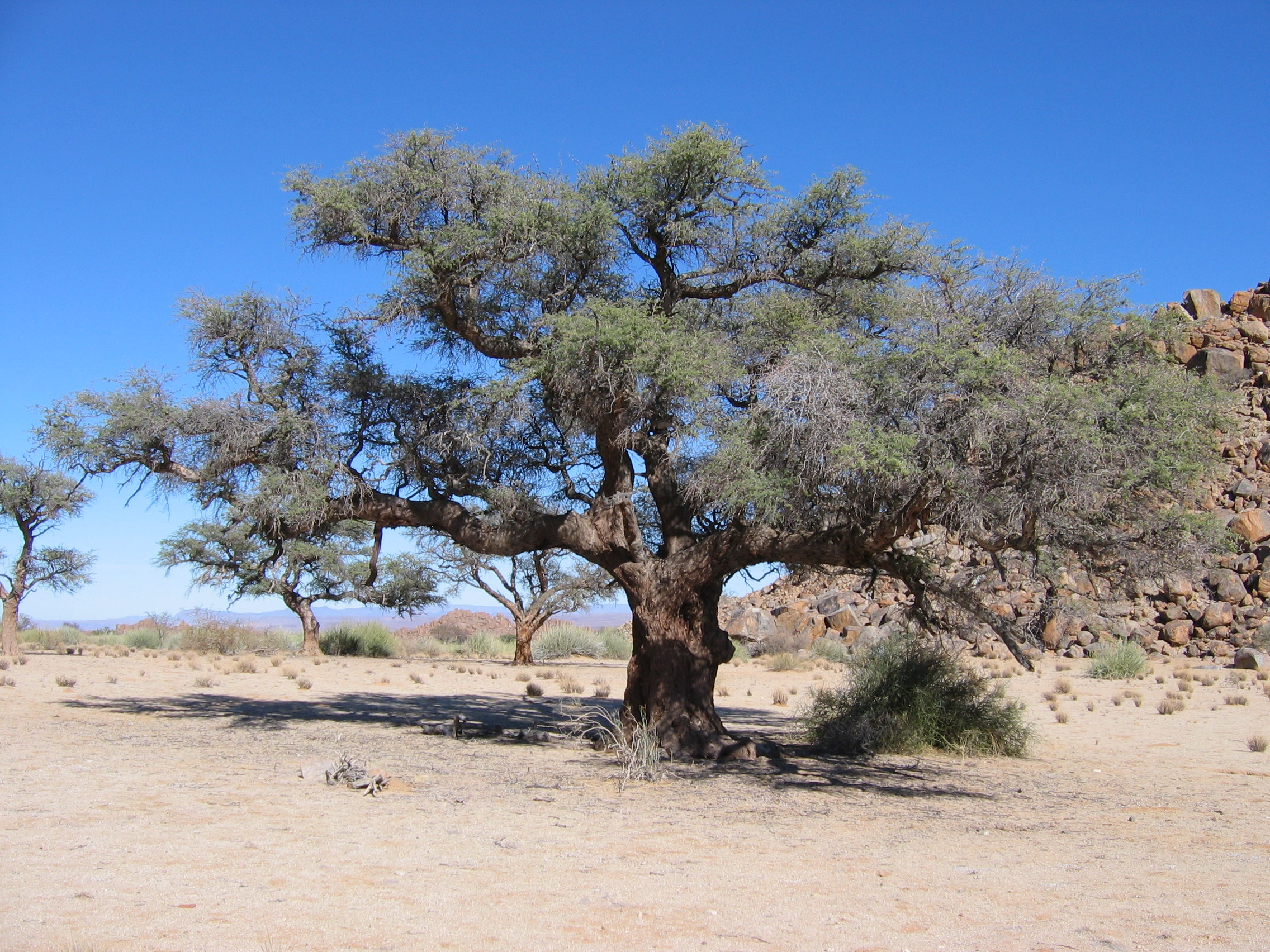 Kameldorn/Kameldornbaum (Acacia erioloba)